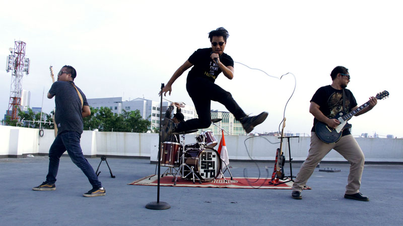 Respito in the making of Freedom video clip